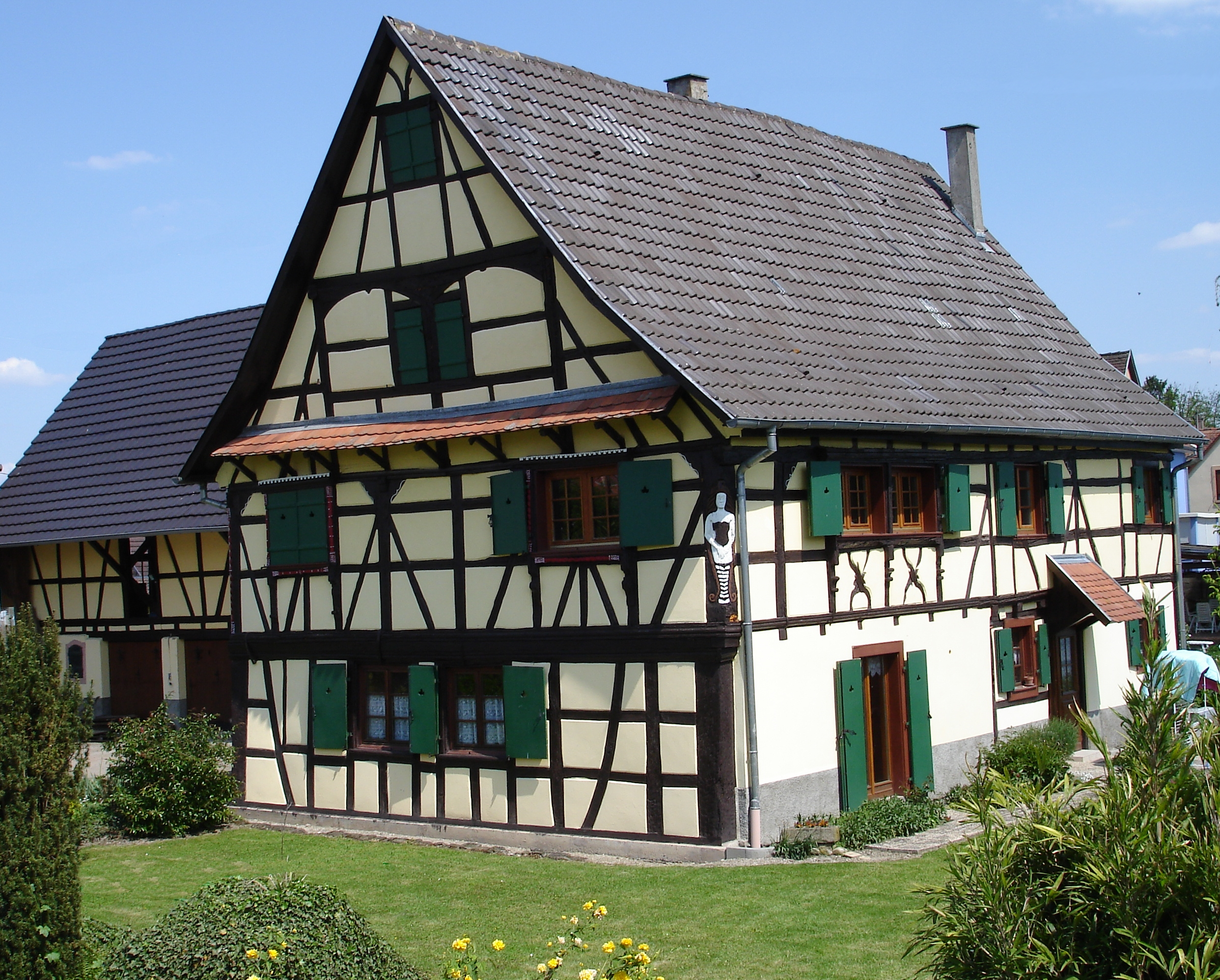 maison traditionnelle alsacienne à Huttenheim (67230 France)